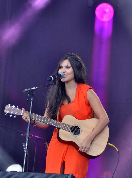 Joyce Jonathan au concert pour l'égalité de SOS-Racisme